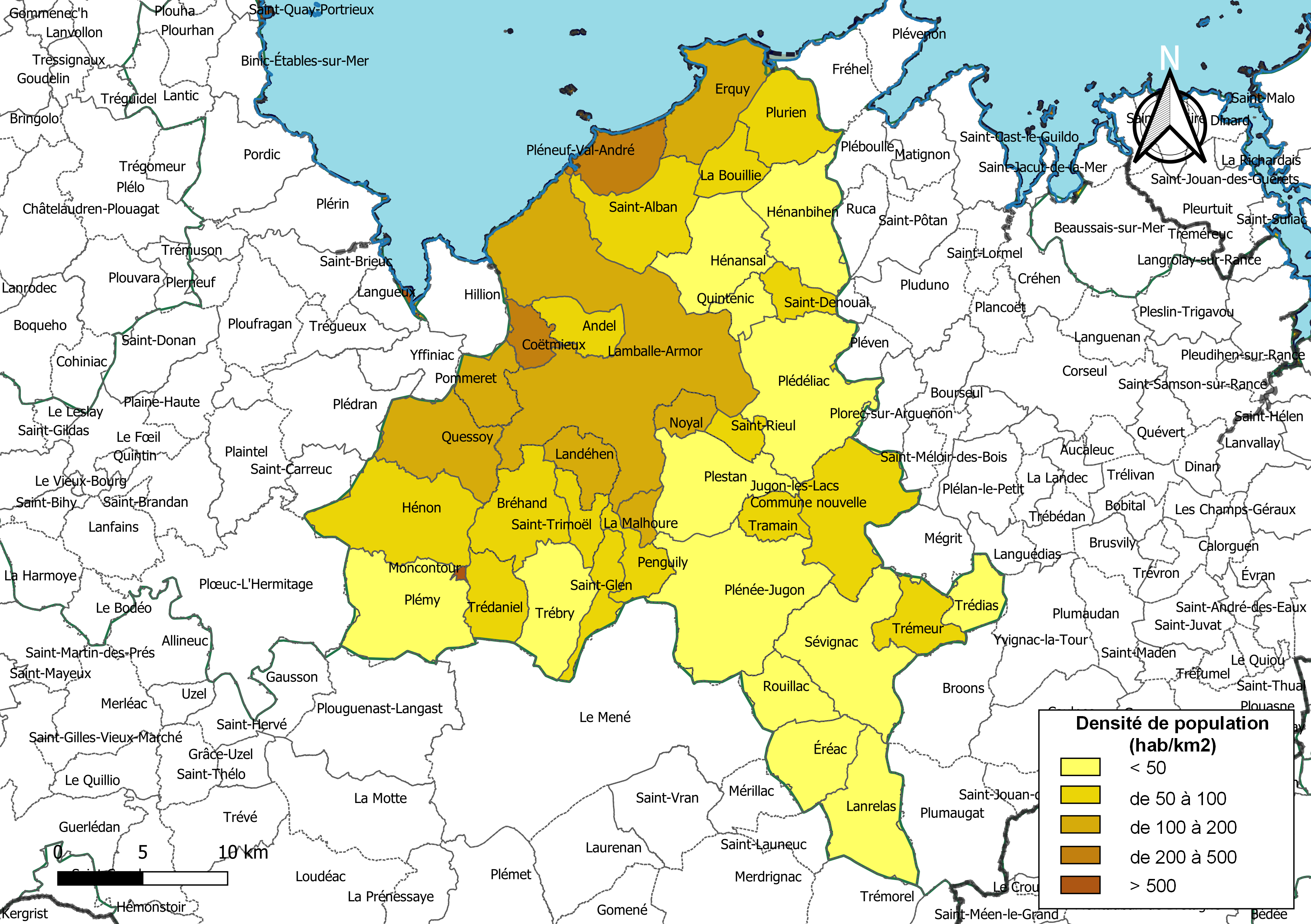 Carte des densités de population (millésimée 2016) des communes de l'intercommunalité Lamballe Terre et Mer, département des Côtes-d'Armor, France. Composition au 1er janvier 2019.